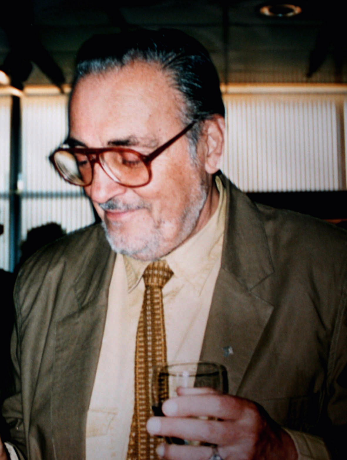 Bob Verstraete, geboren als Hendrik Jan De Graef (Rotterdam, 17 september 1921 - Amstelveen, 27 augustus 1993) was een Nederlands acteur, regisseur en schrijver. -- Foto gemaakt tijdens uitreiking van goudepenning aan Bob Verstraete door gemeente Amstelveen.